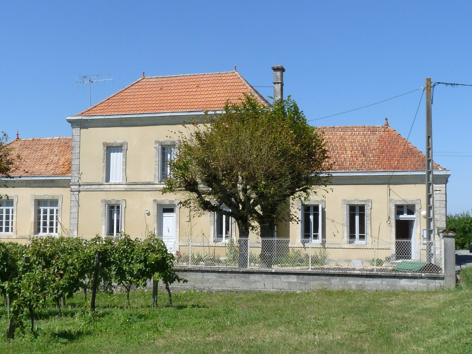 Mairie de Neulles, Charente-Maritime, France